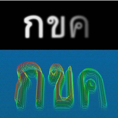 vertex ของแบบจำลองสามมิติรูปตาข่าย (ภาพล่าง) ถูกเปลี่ยนแปลงความสูงต่ำตาม heightmap จากภาพบน